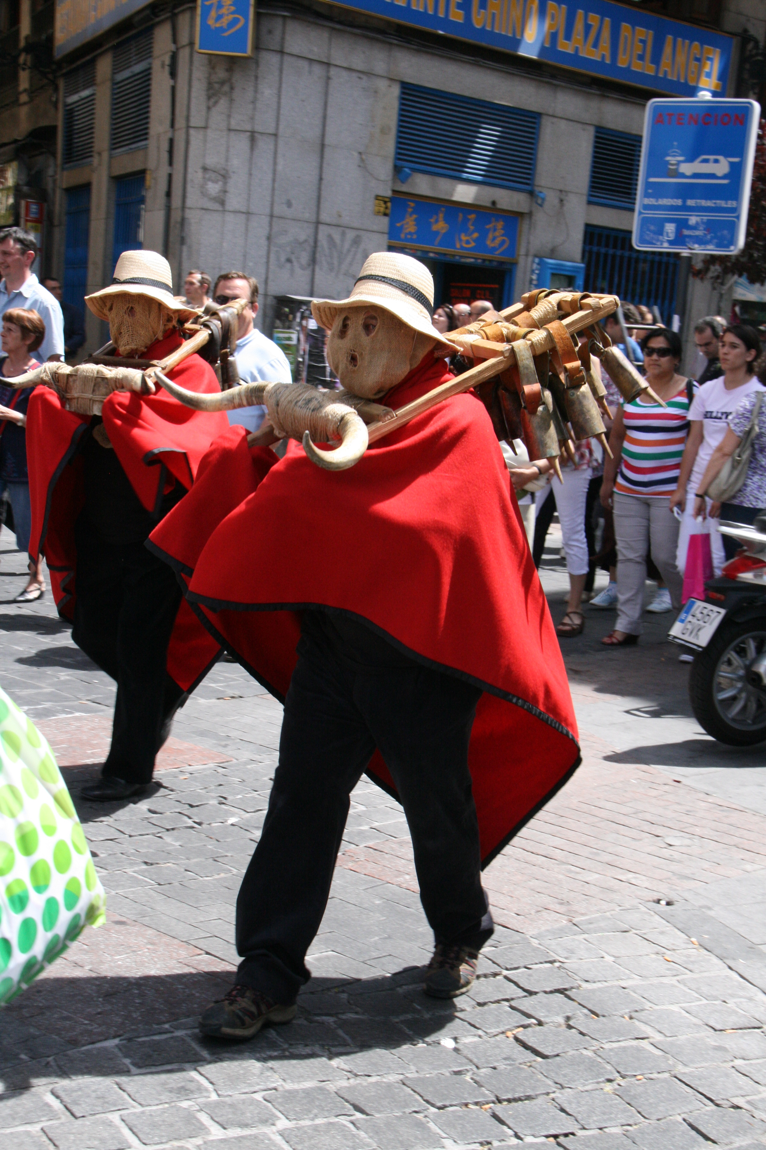 Botargas de Robledillo de Mohernando (Guadalajara, España) en Madrid.